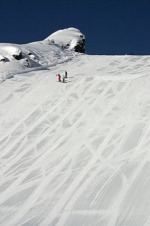 Skipiste ob La Chaux